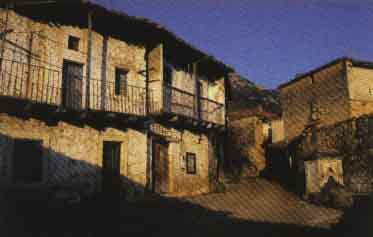 Plaza del Pueblo (Valhermosa - Burgos)